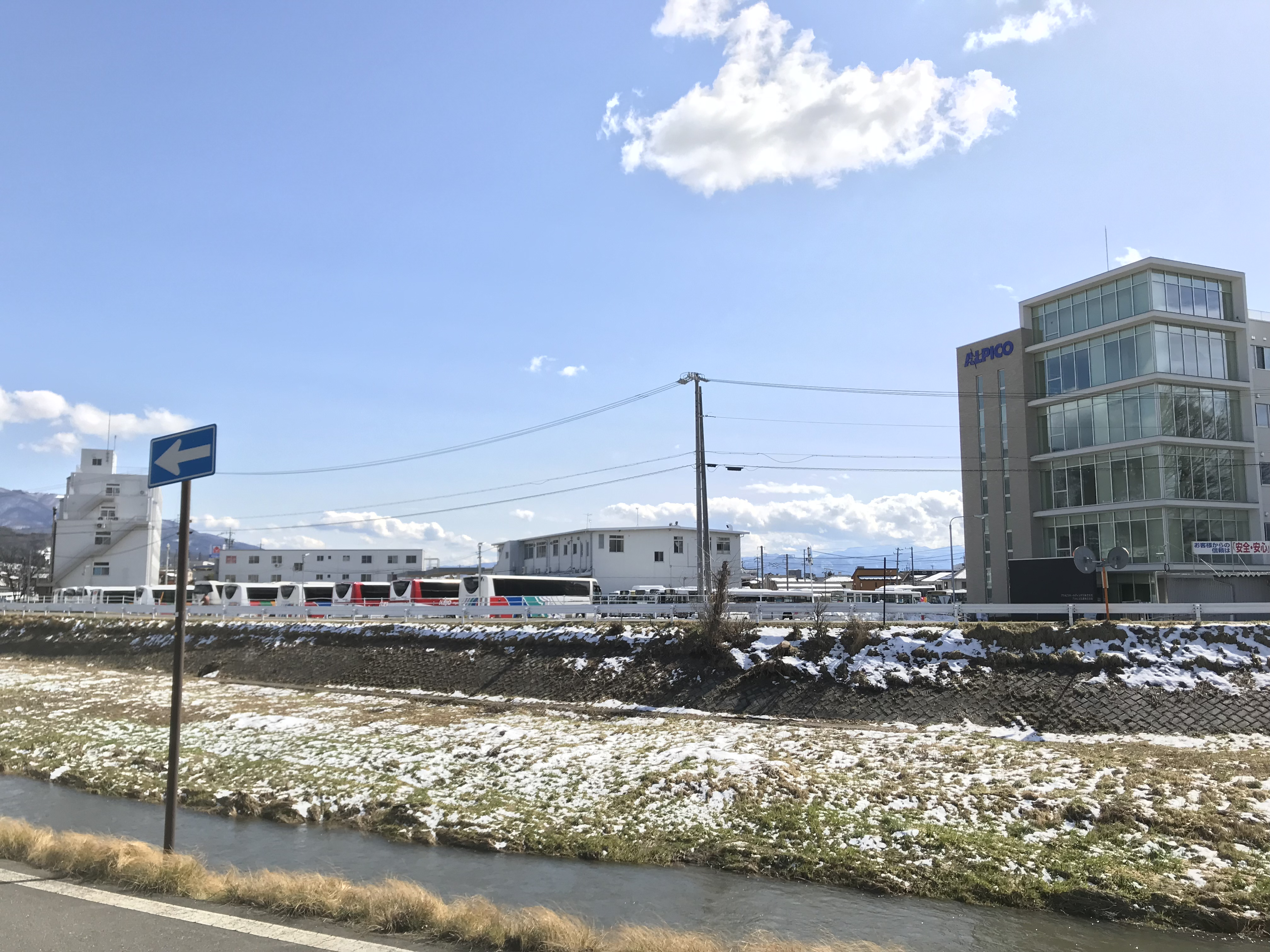 アルピコホールディングス本社。